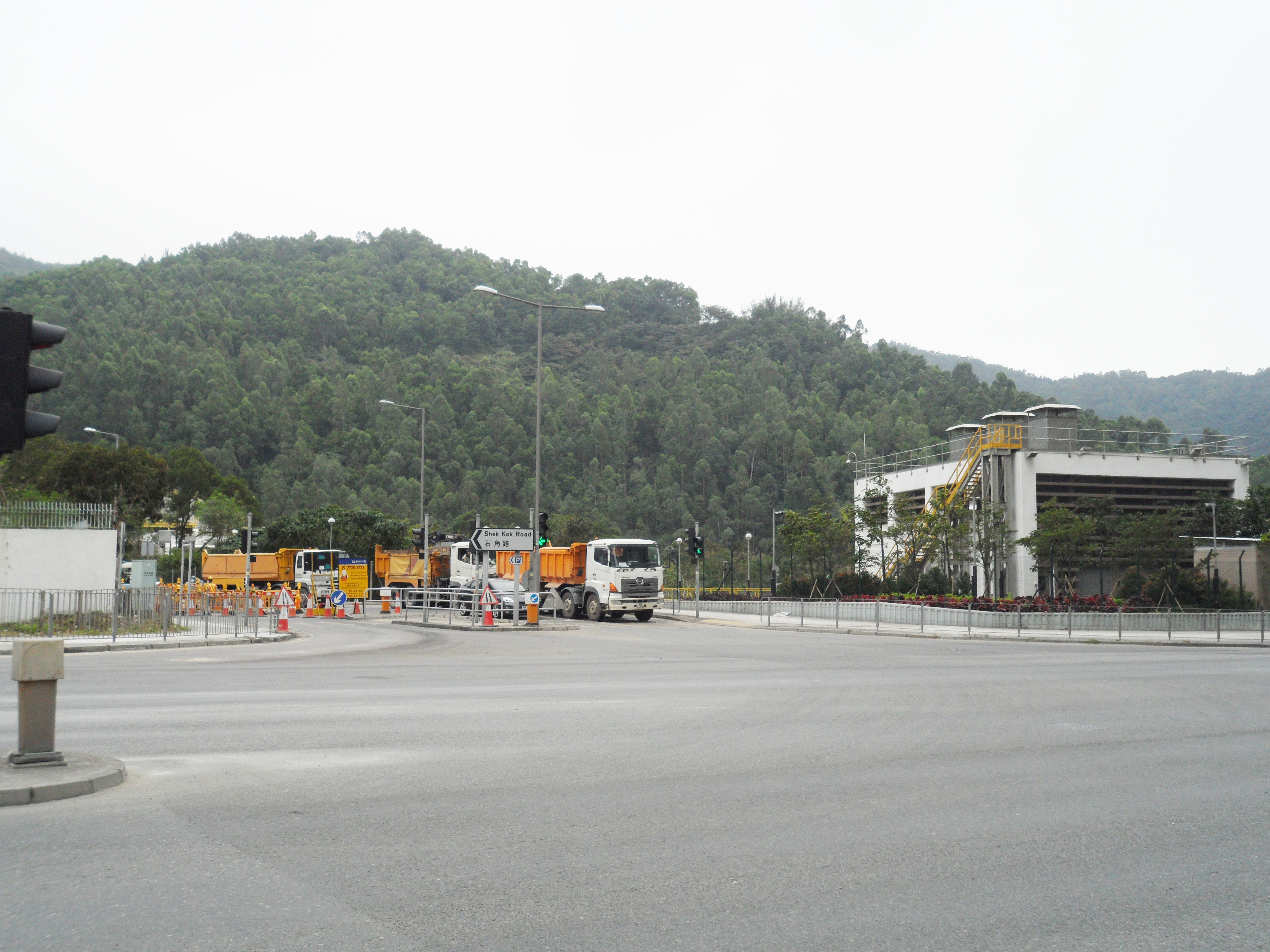 石角路與環保大道交界